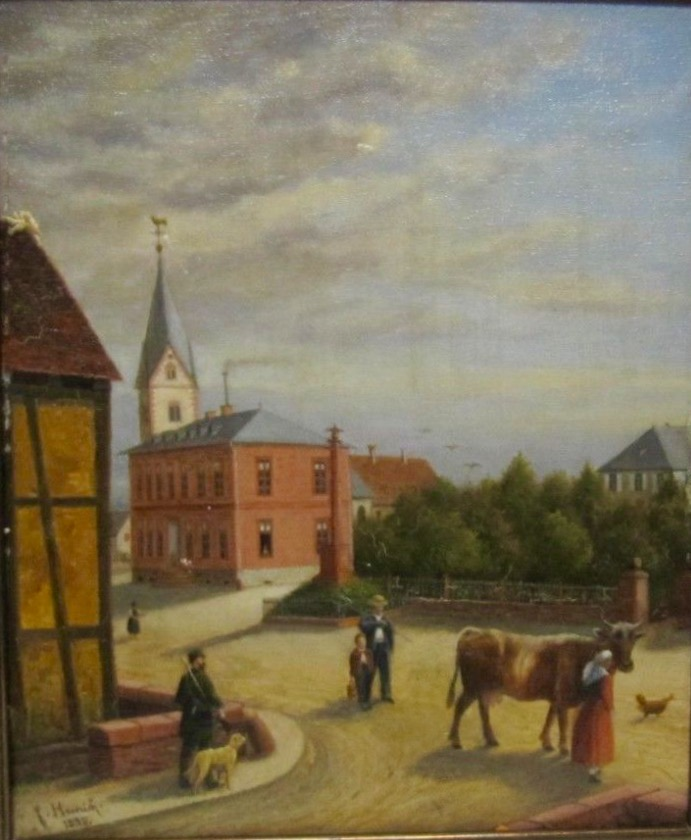 F. Henrich: Bierstadt bei Wiesbaden mit Ansicht der Kirche, der alten Schule und des Kriegerdenkmals, Öl auf Leinwand, 37 x 31,5 cm, Privatsammlung Wiesbaden.